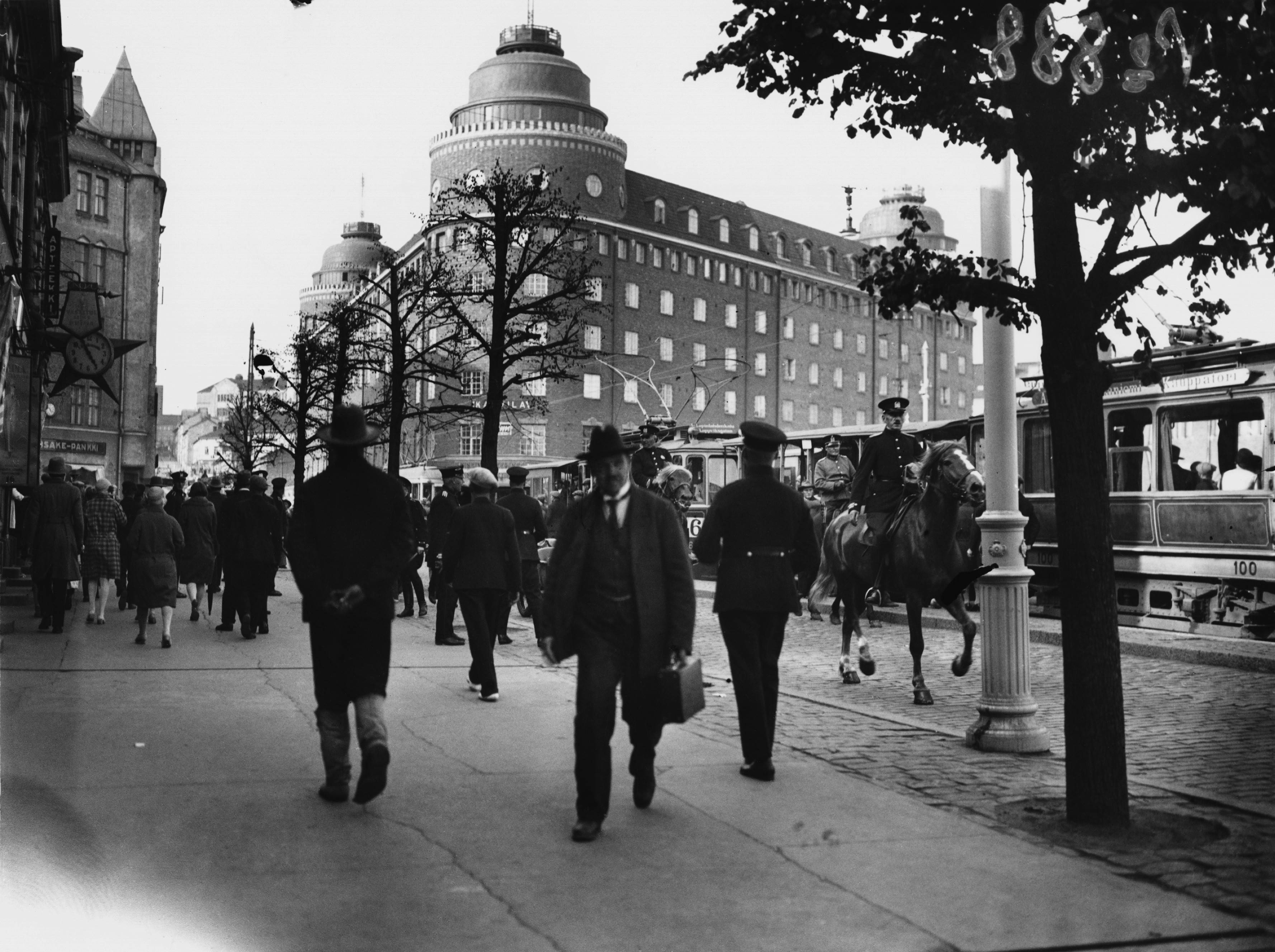 Punainen päivä 1.8.1929, Suomen Ammattijärjestön toimeenpanema mielenosoitus